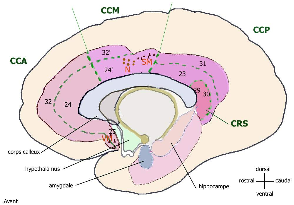 Divisions du cortex cingulaire :1 CCA cortex cingulaire antérieur2 CCM cortex cingulaire moyen3 CCP cortex cingulaire postérieur4 CRS cortex retrosplenial